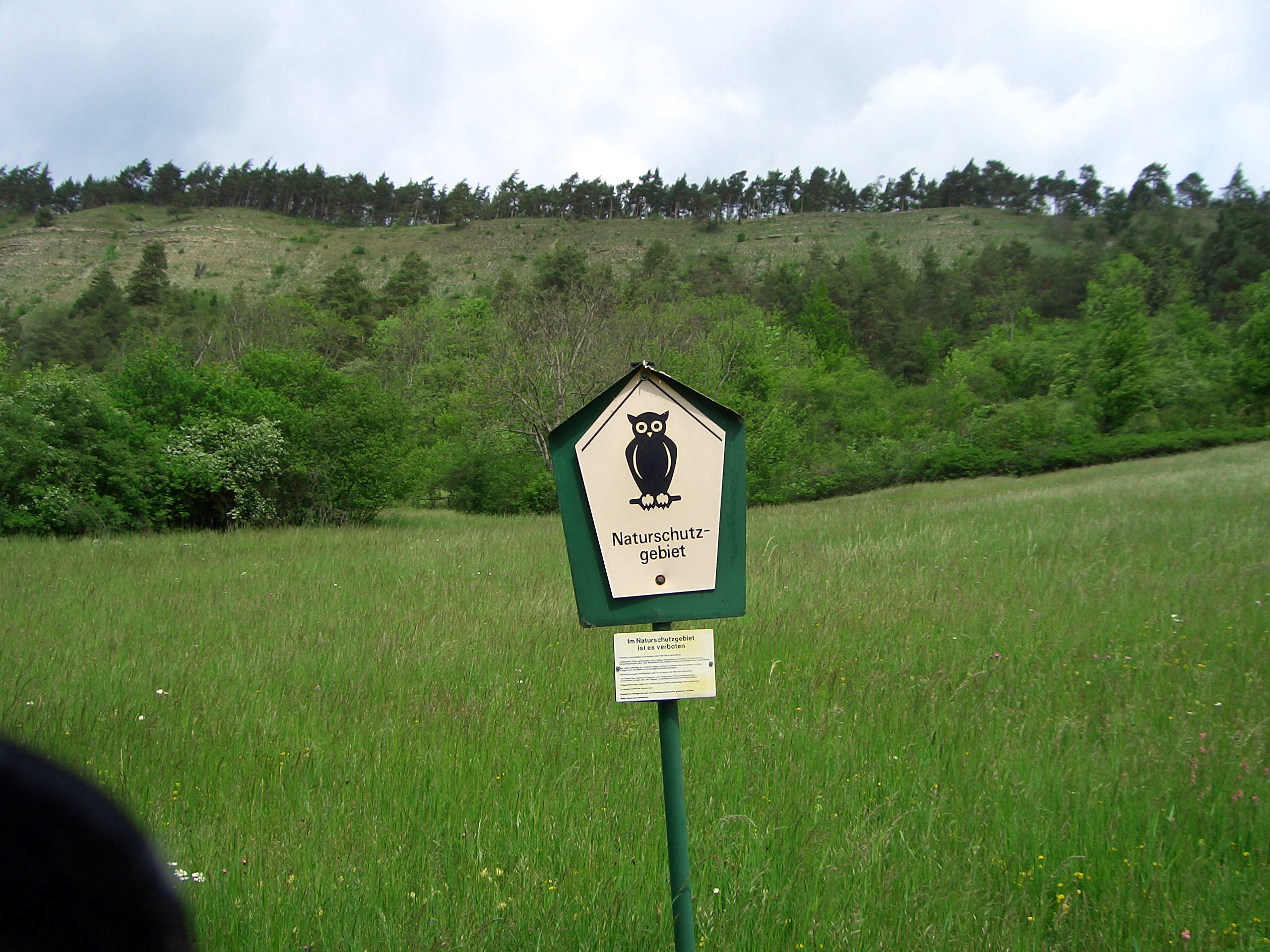 Naturschutzschild im Leutratal bei Jena, Thüringen.